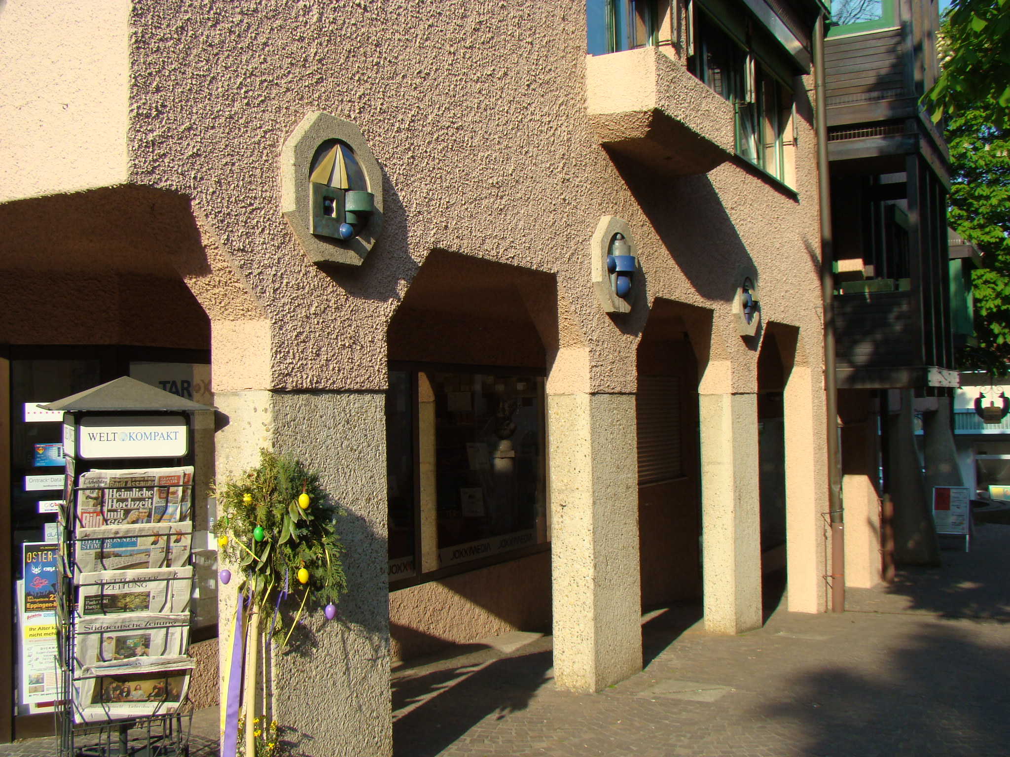 Fassadenrelief von Lee Babel in Güglingen